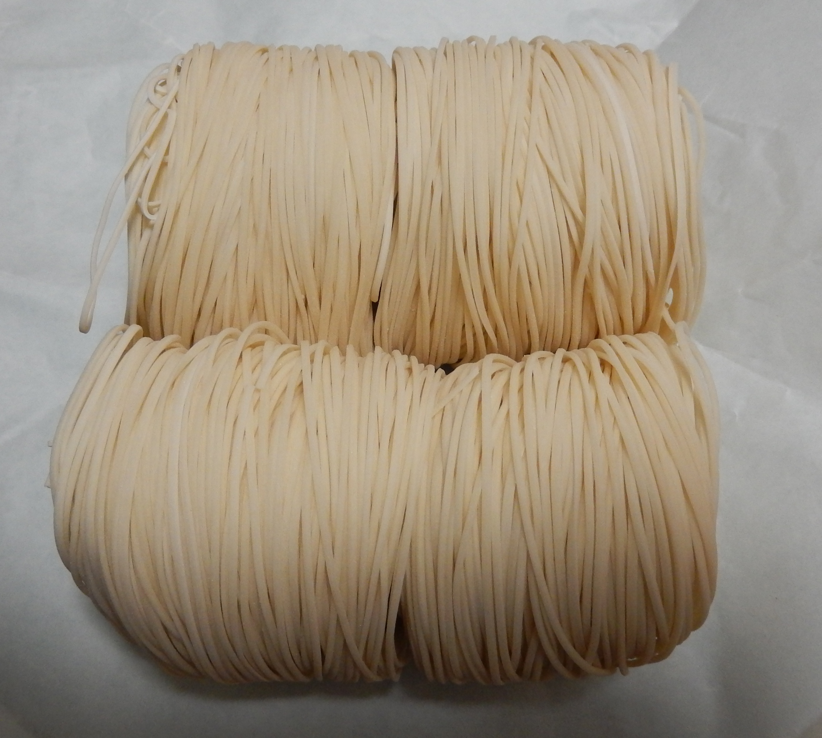 大門素麺１袋分